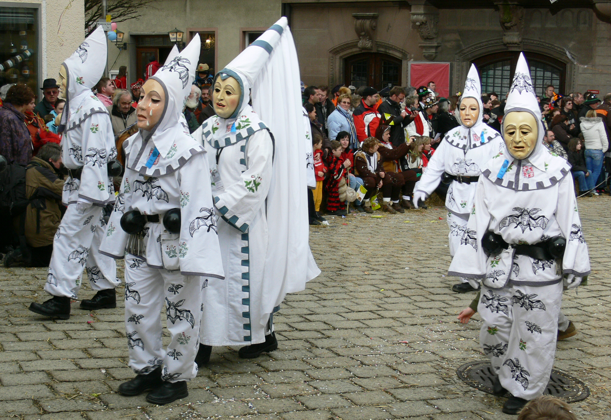 Plätzlerzunft Weingarten, Figur: Lauratalgeister Veranstaltung: Narrensprung beim Narrentreffen Meßkirch 2006